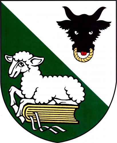 znak, Spělkov, okres Žďár nad Sázavou